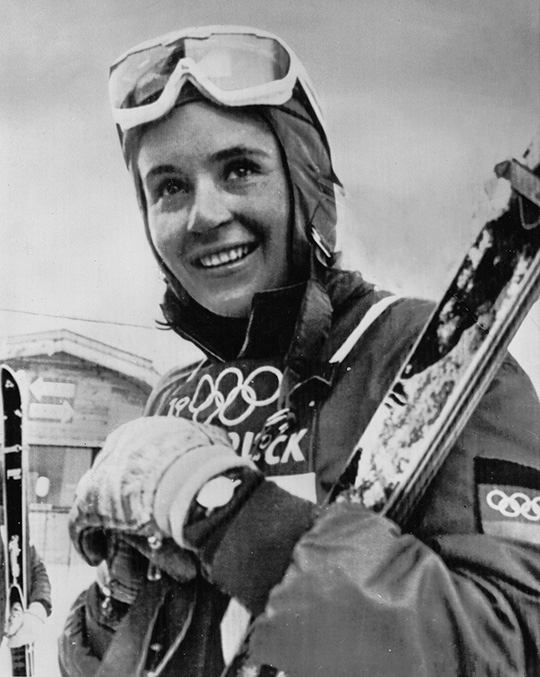 1964 PRESS PHOTO YOUNG GERMAN SKIER, BARBIE HENNEBERGER DURING WINTER OLYMPICS